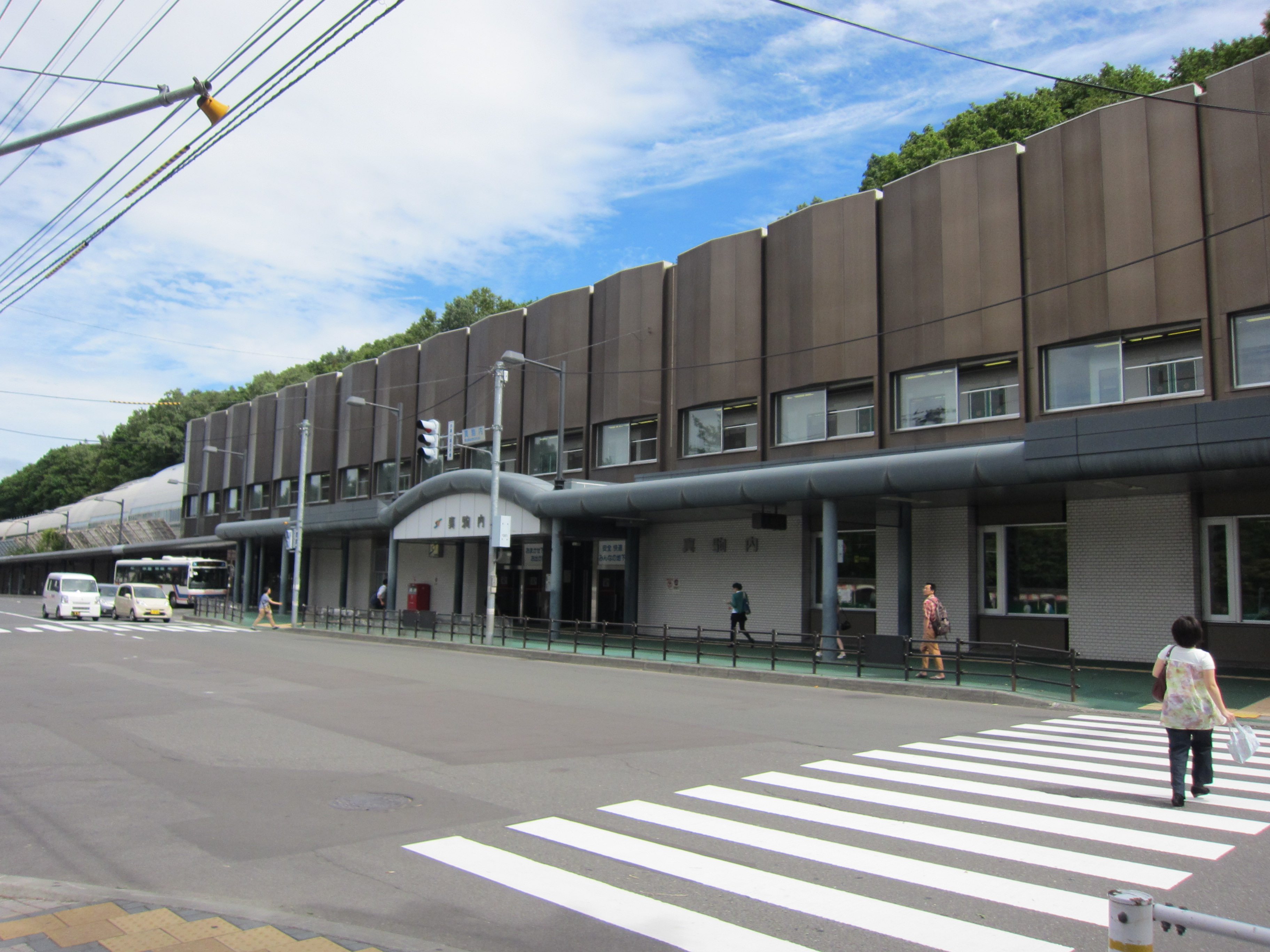 札幌市営地下鉄の真駒内駅